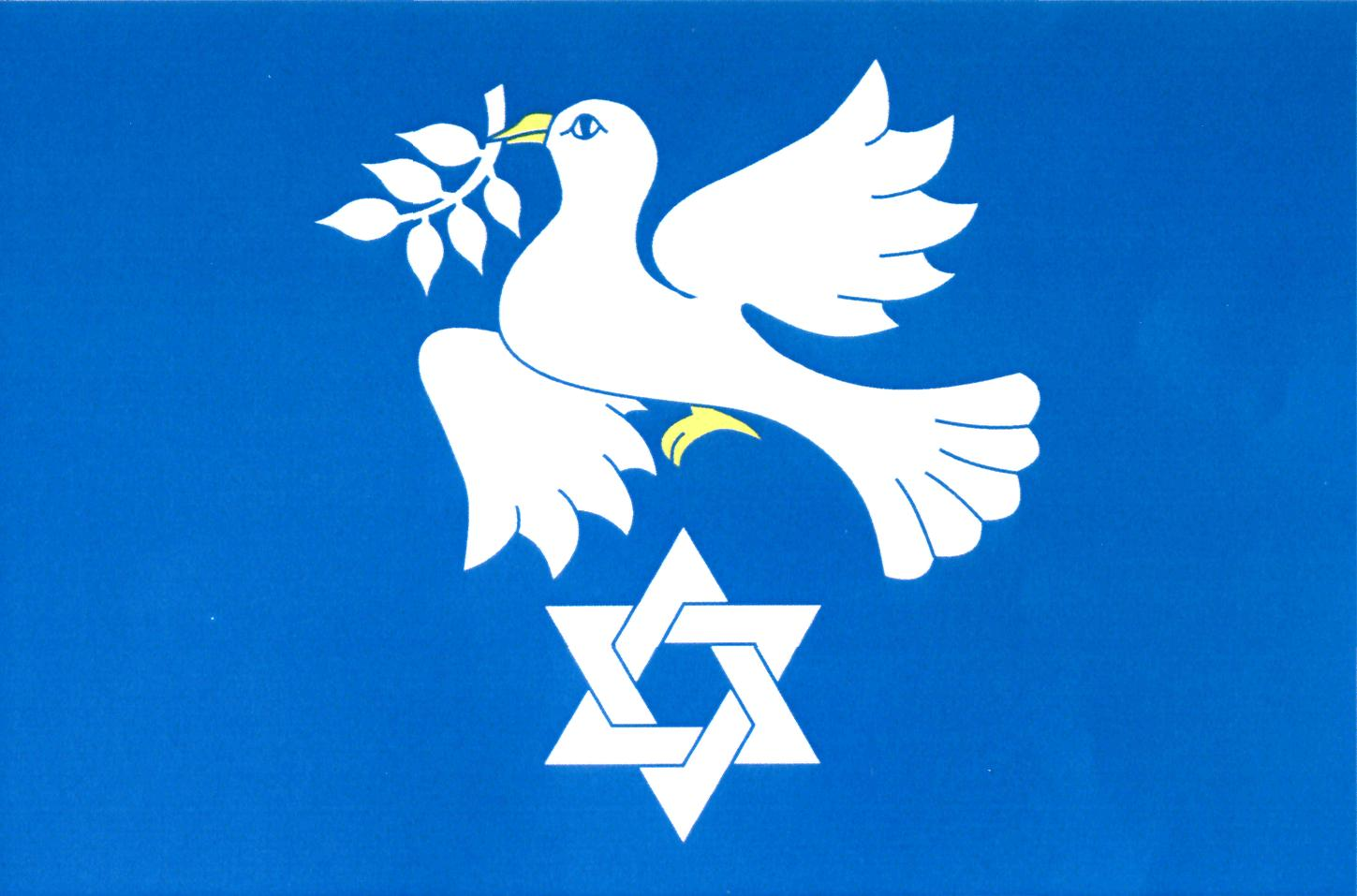 Vlajka obce Hroubovice